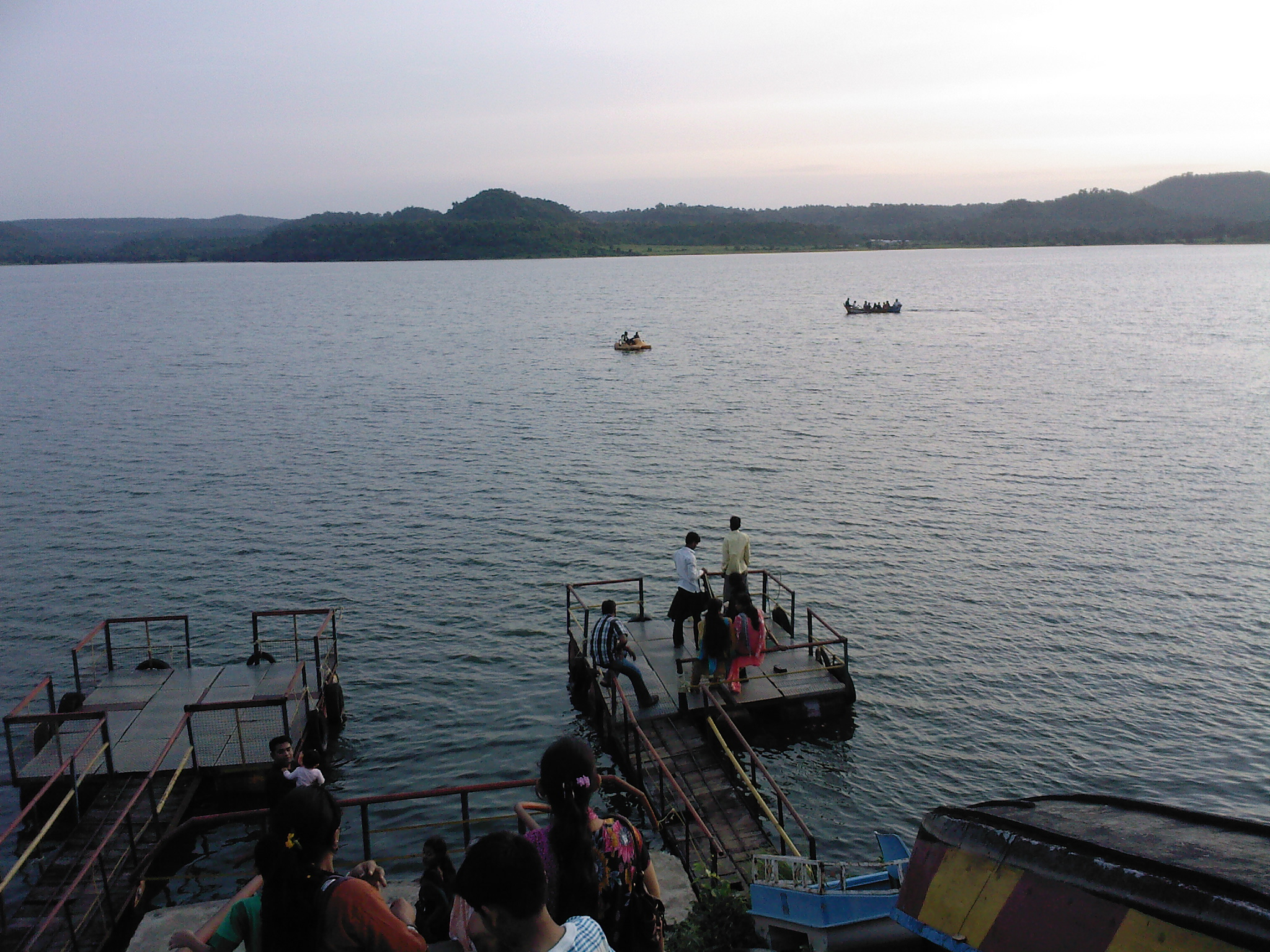 borgaon dam , yavatmal